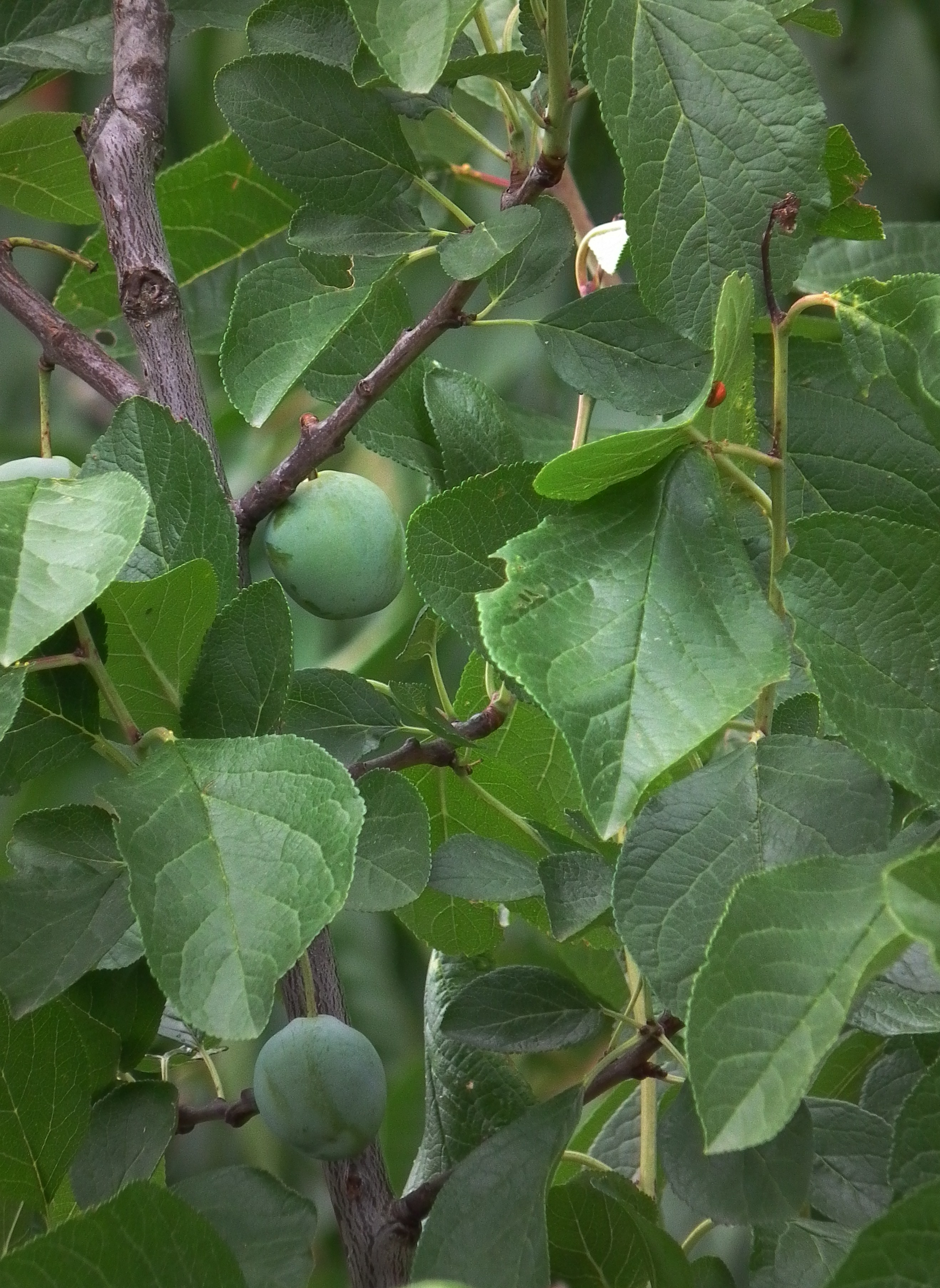 Unreife Edelpflaume "Graf Althans Reneklode" (Prunus domestica subsp. rotunda), fotografiert in Heidelberg (Baden-Württemberg, Deutschland)